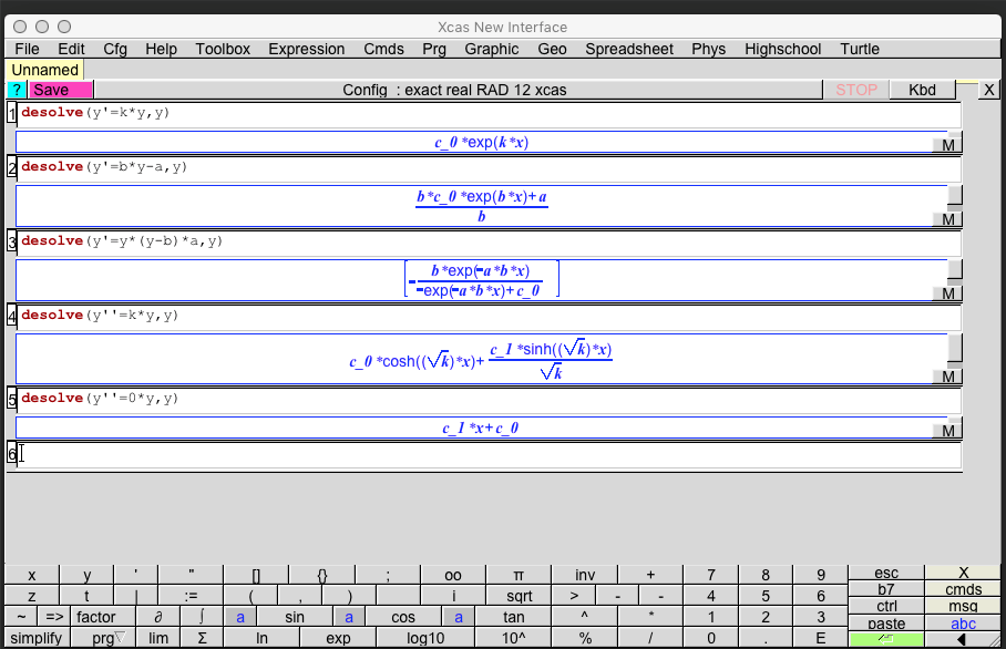 Sådan løser Xcasdifferentialligninger